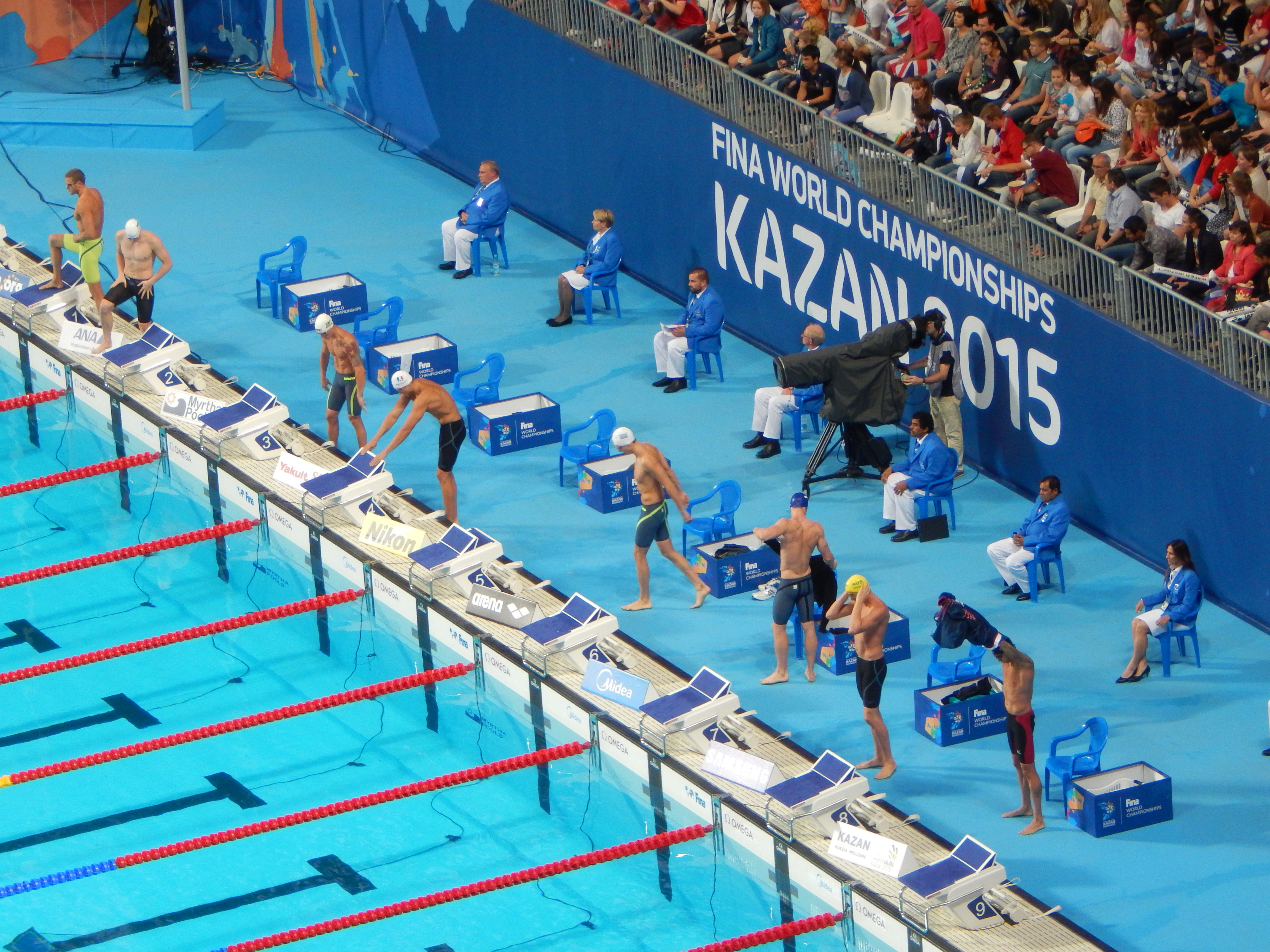 Второй полуфинал на дистанции 50 метров вольным стилем у мужчин в Казани